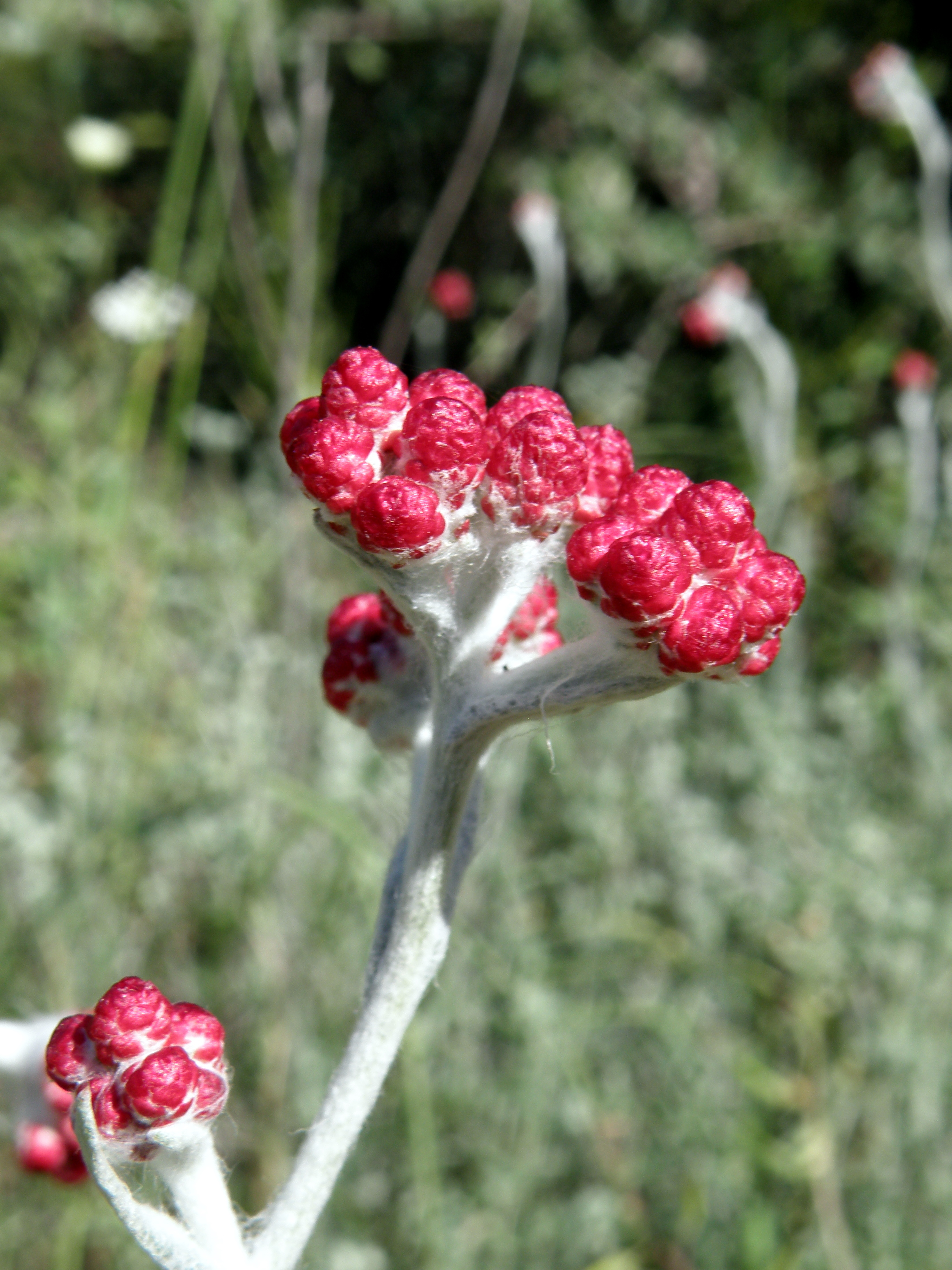 דם המכבים Gazelle Valley